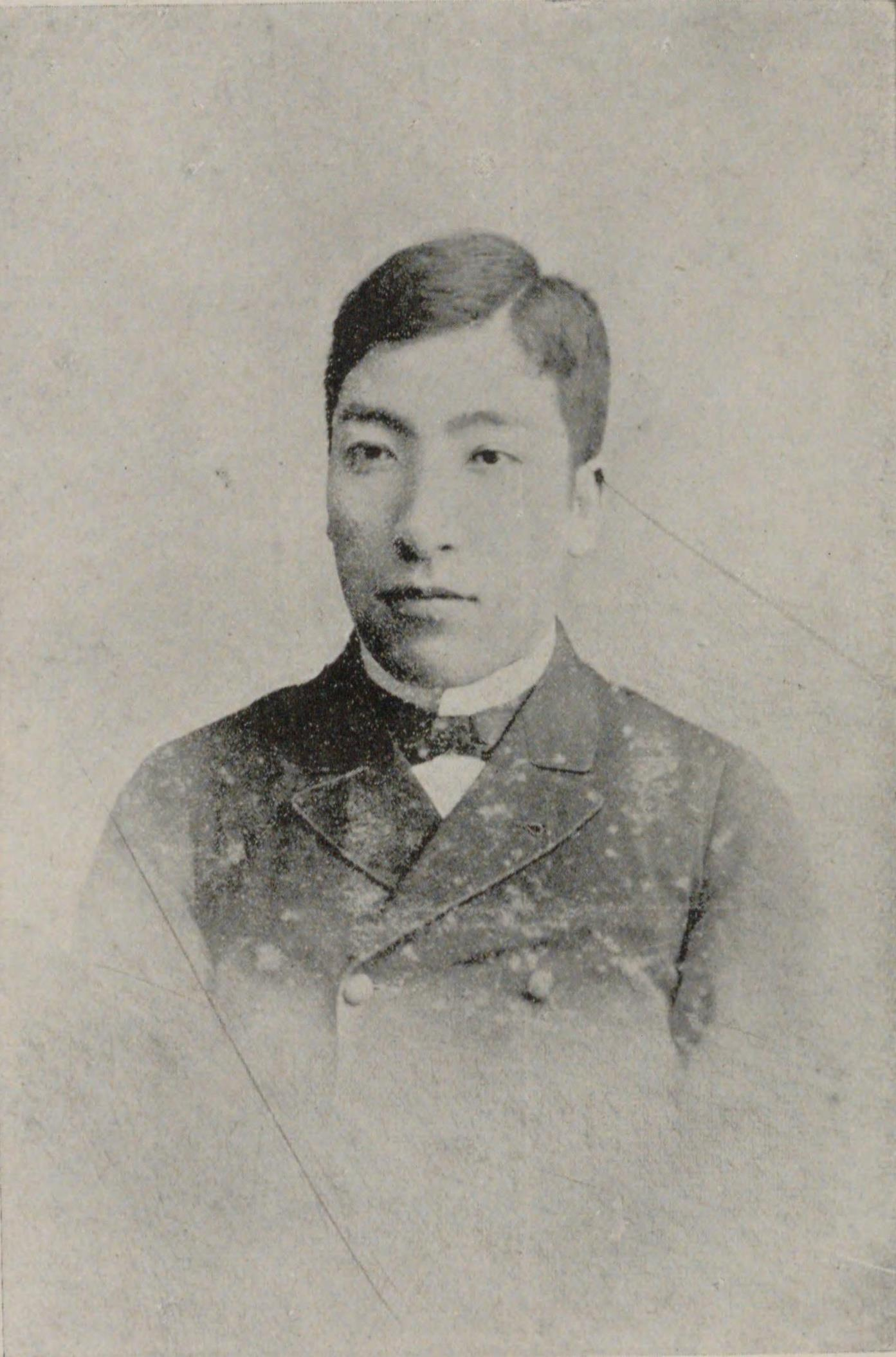 栗林五朔の青年時代その二